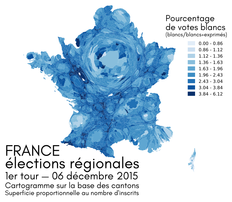 Cartogramme du vote blanc (blanc/blanc+exprimés) des élections régionales françaises. 1er tour — 06 décembre 2015. Cartogramme sur la base des cantons : superficie proportionnelle au nombre d'inscrits. Version vectorielle. Voir aussi File:Cartogramme vote blanc régionales 2015 tour 1 par canton.svg